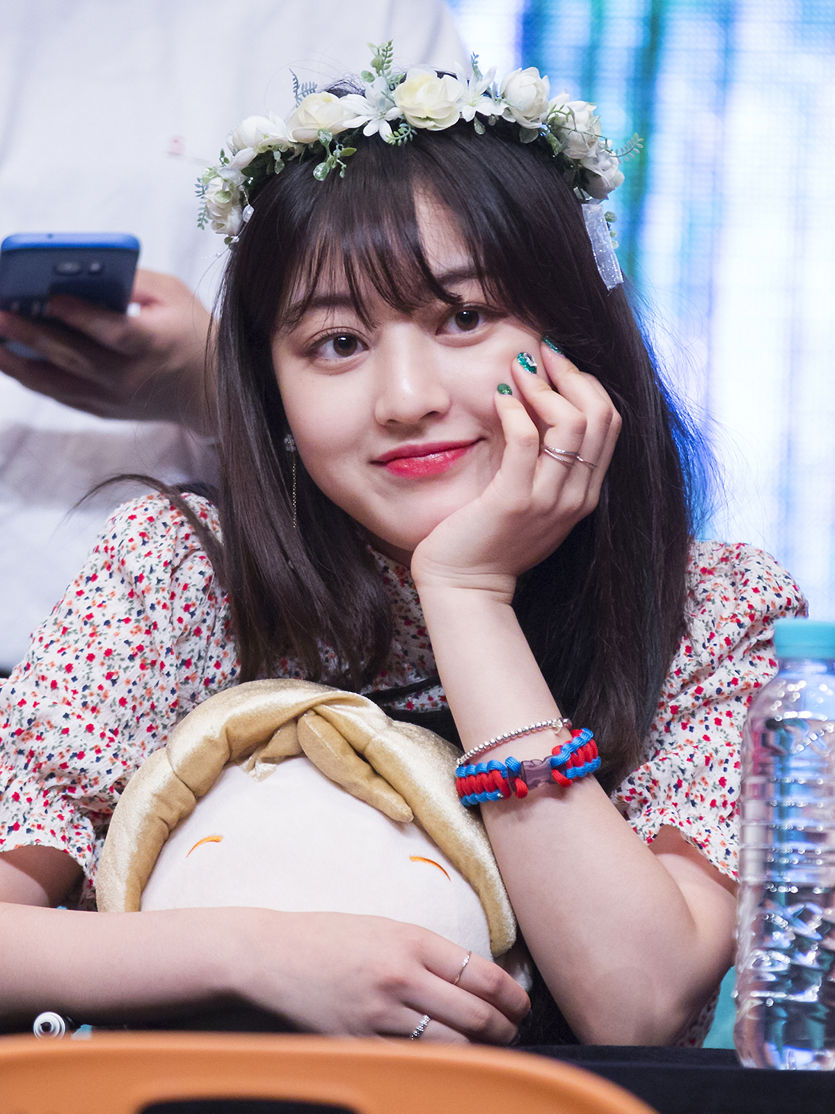 170610 영등포팬싸 지효